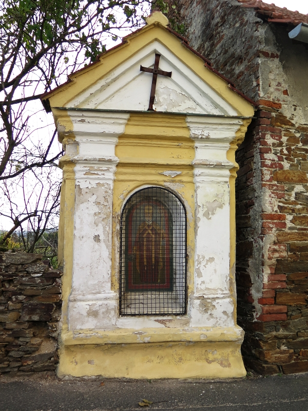 Kaple svatého Prokopa, Nechyba (Úžice).